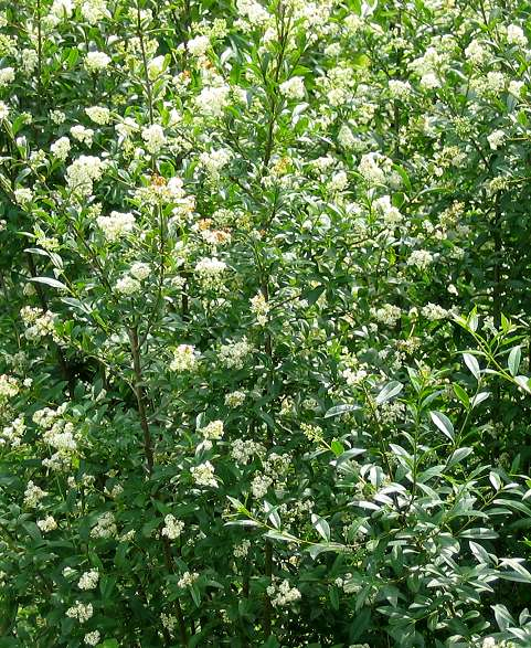 Ligusterstrauch